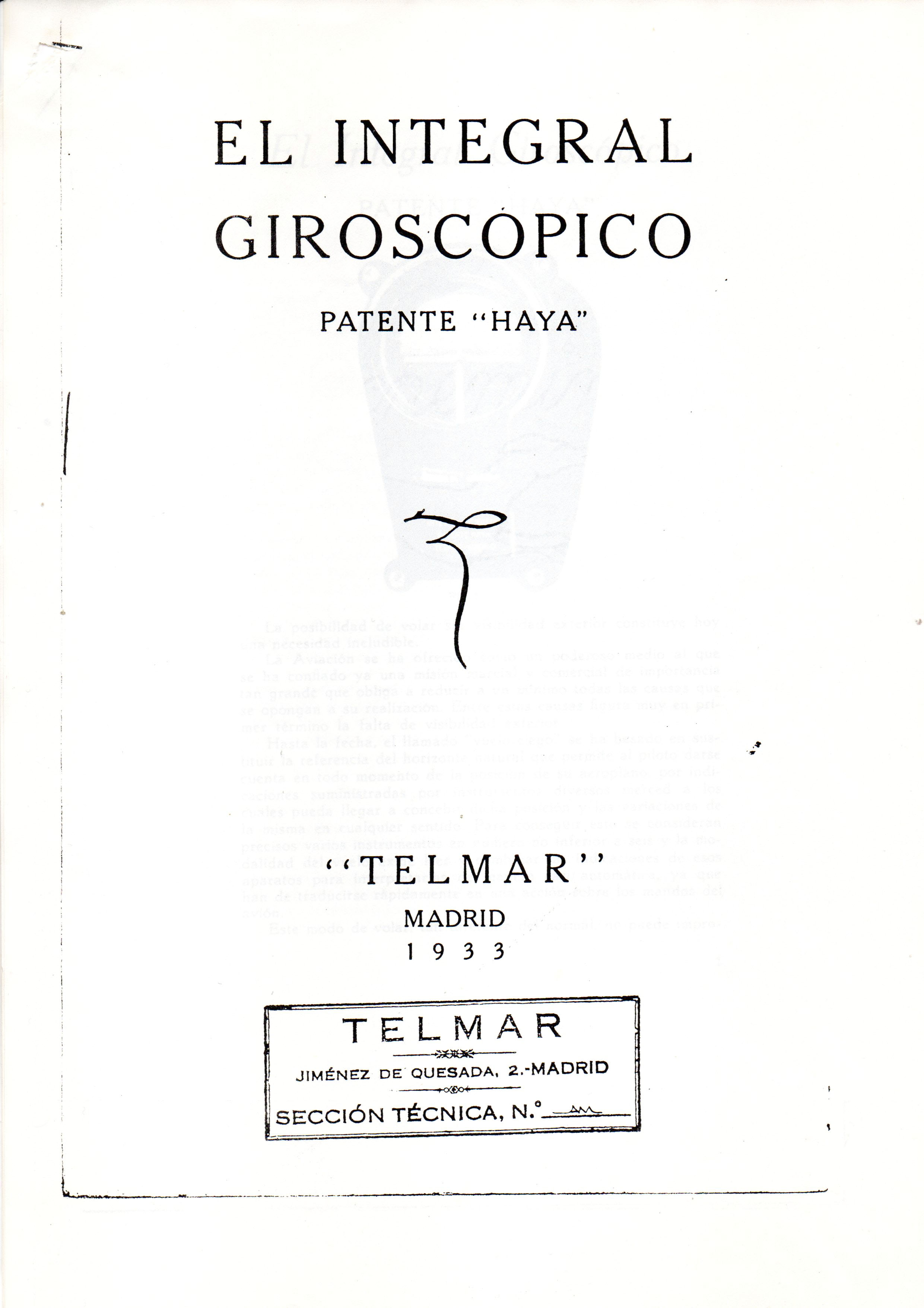 Patente española del Integral Haya.